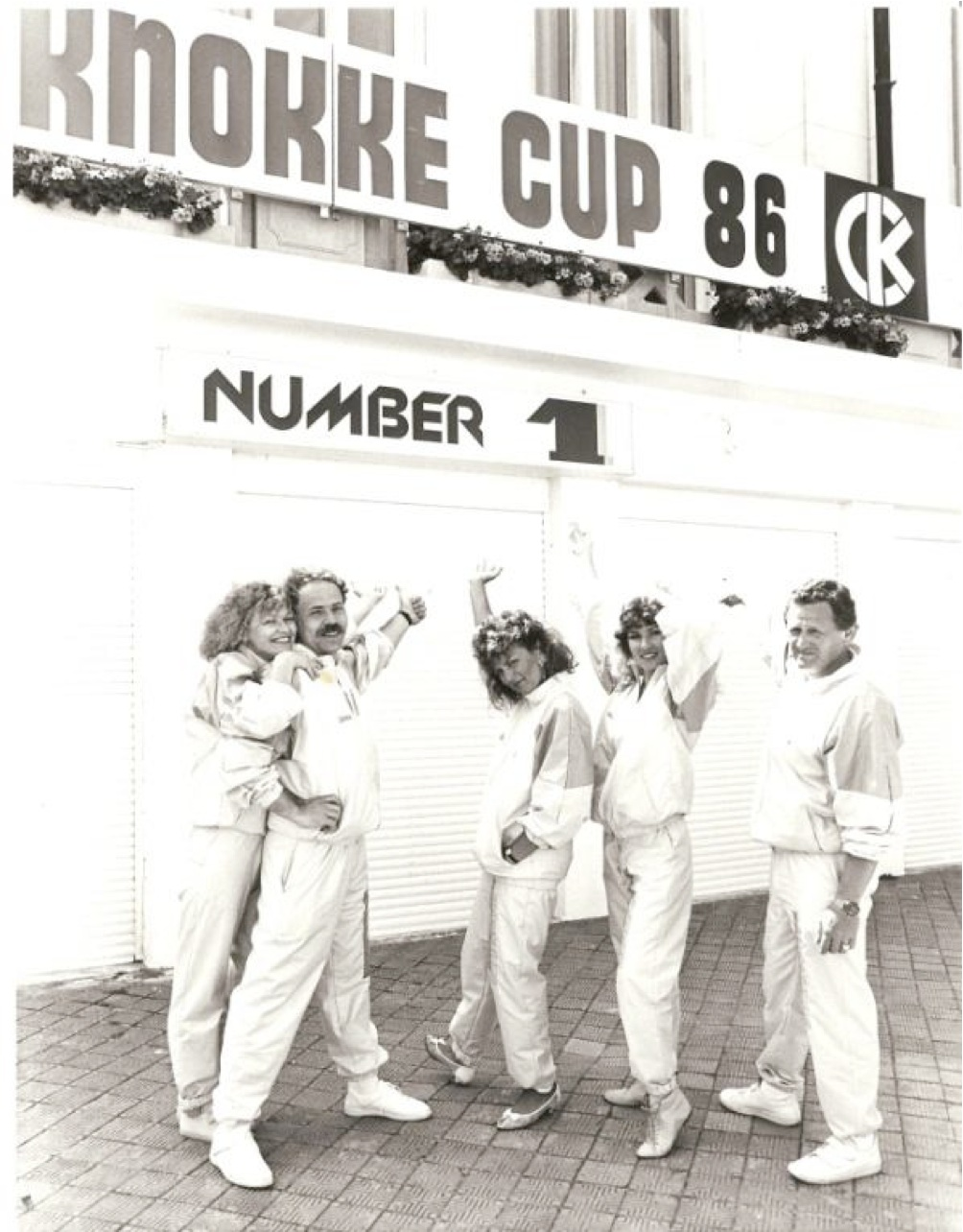 Festiwal Knokke Cup, Belgia, 1986r.